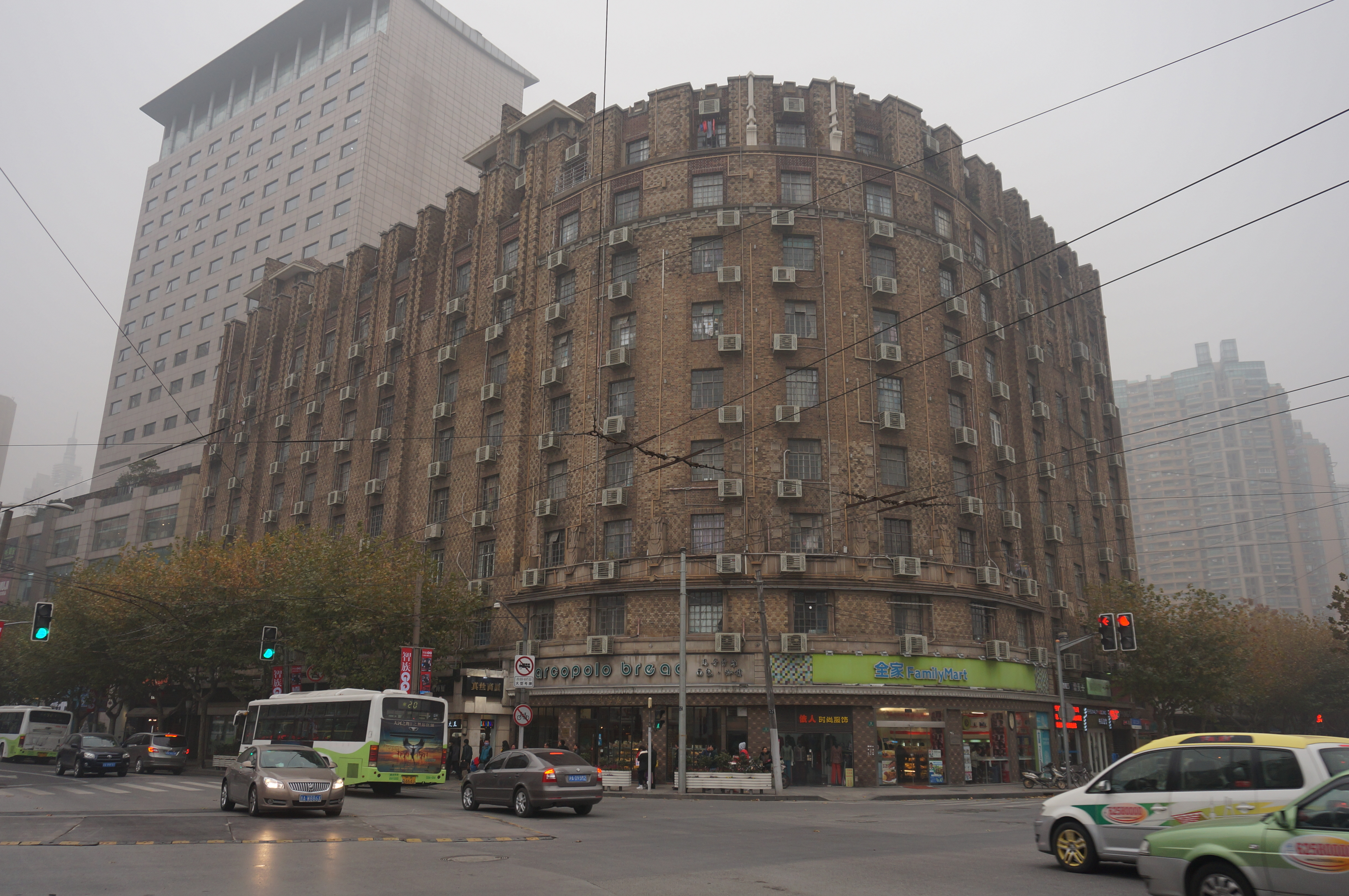 上海德义大楼